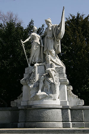 Monument de la République à Neuchâtel